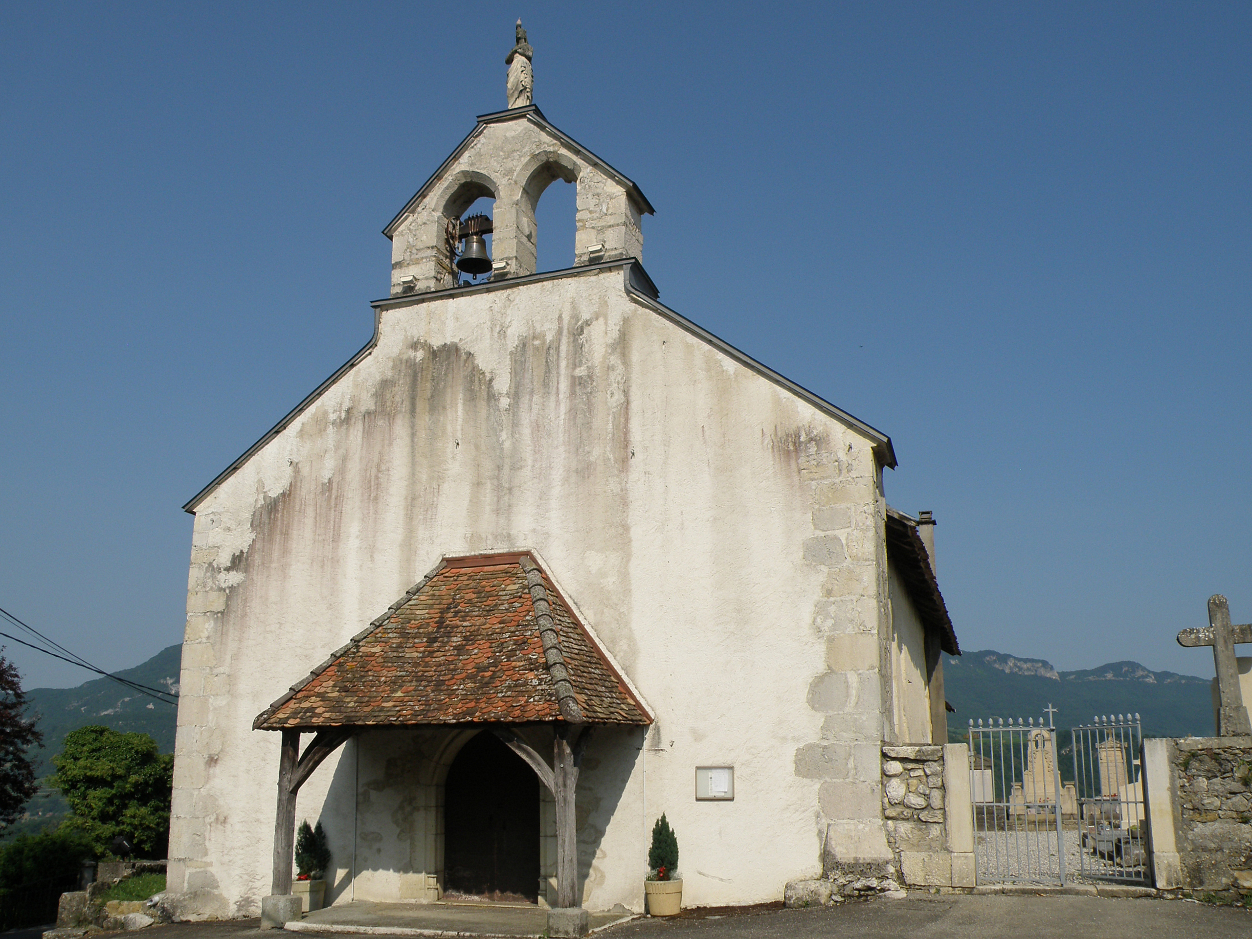 Nattages, comm. du département de l’Ain (région Rhône-Alpes, France), sur la rive droite (occidentale) du Rhône. Église paroissiale Saint-Pierre.